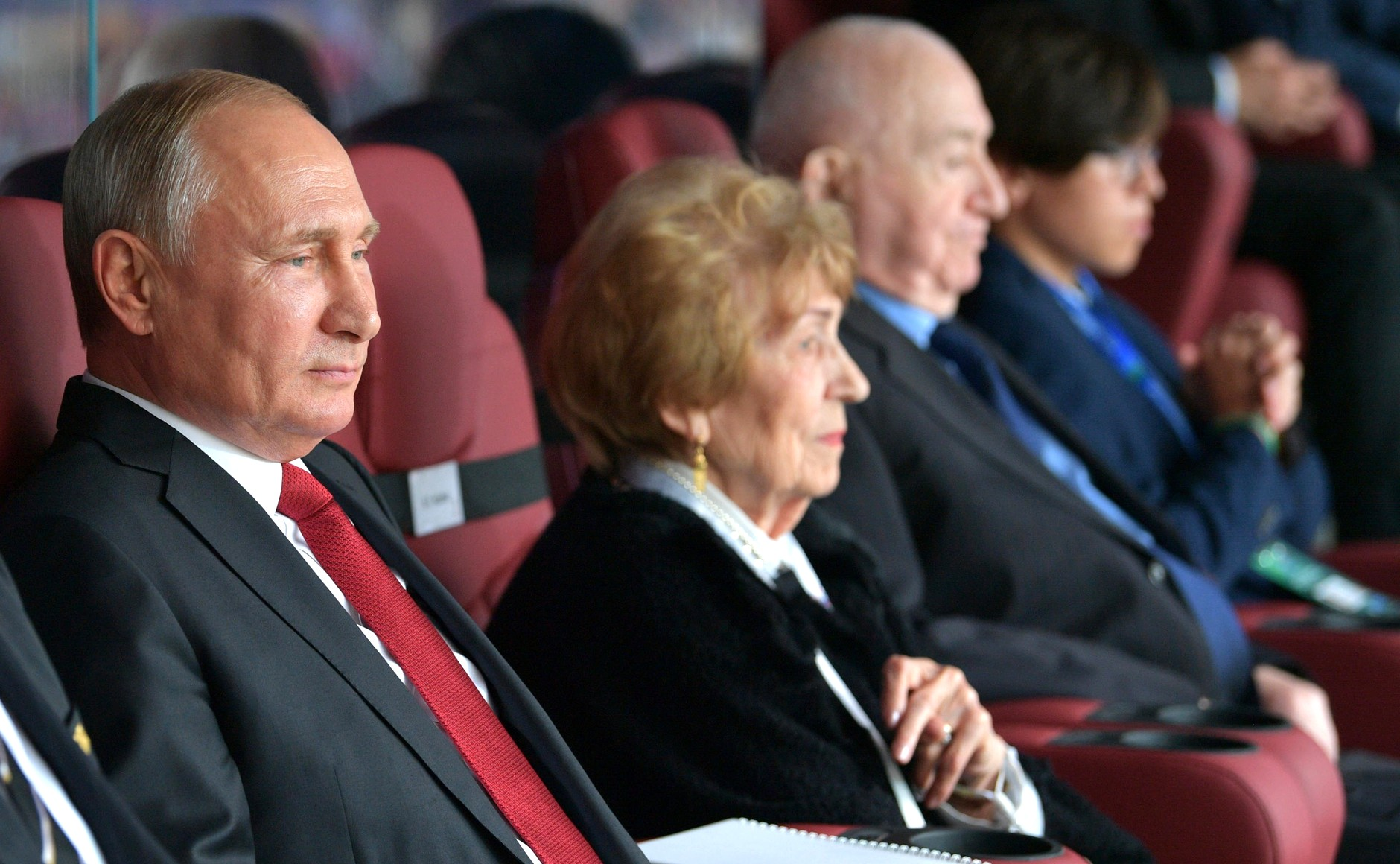 Церемония открытия чемпионата мира по футболу 2018 года